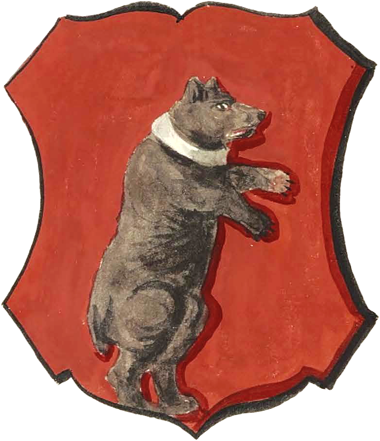 Герб Жемайтского староства